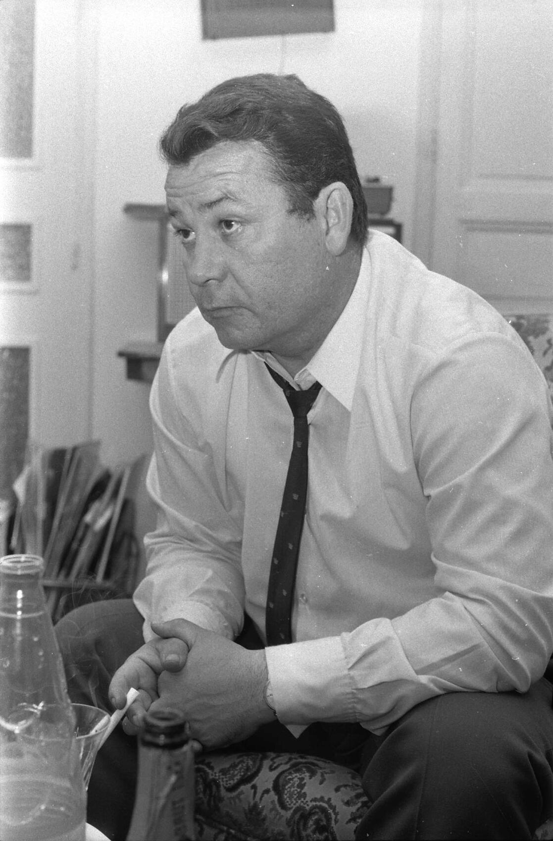 Domicile de Just Fontaine à Toulouse. 7 Juillet 1971. Vue de Just Fontaine, ancien joueur international français, à son domicile toulousain.